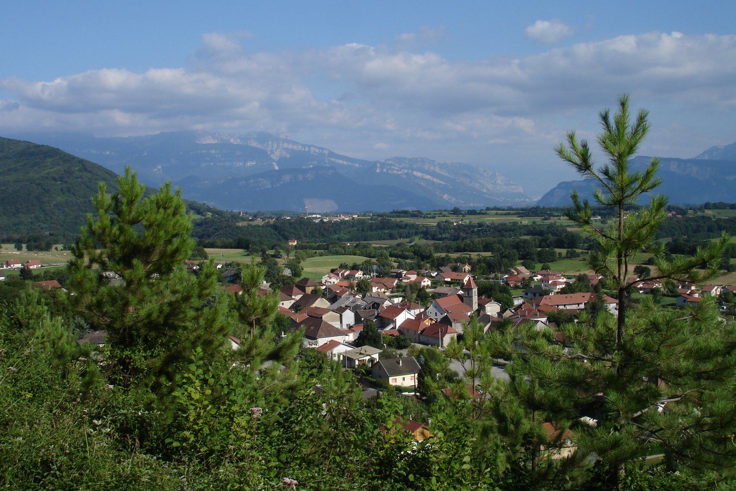 Apprieu, vue vers le Sud-Est.